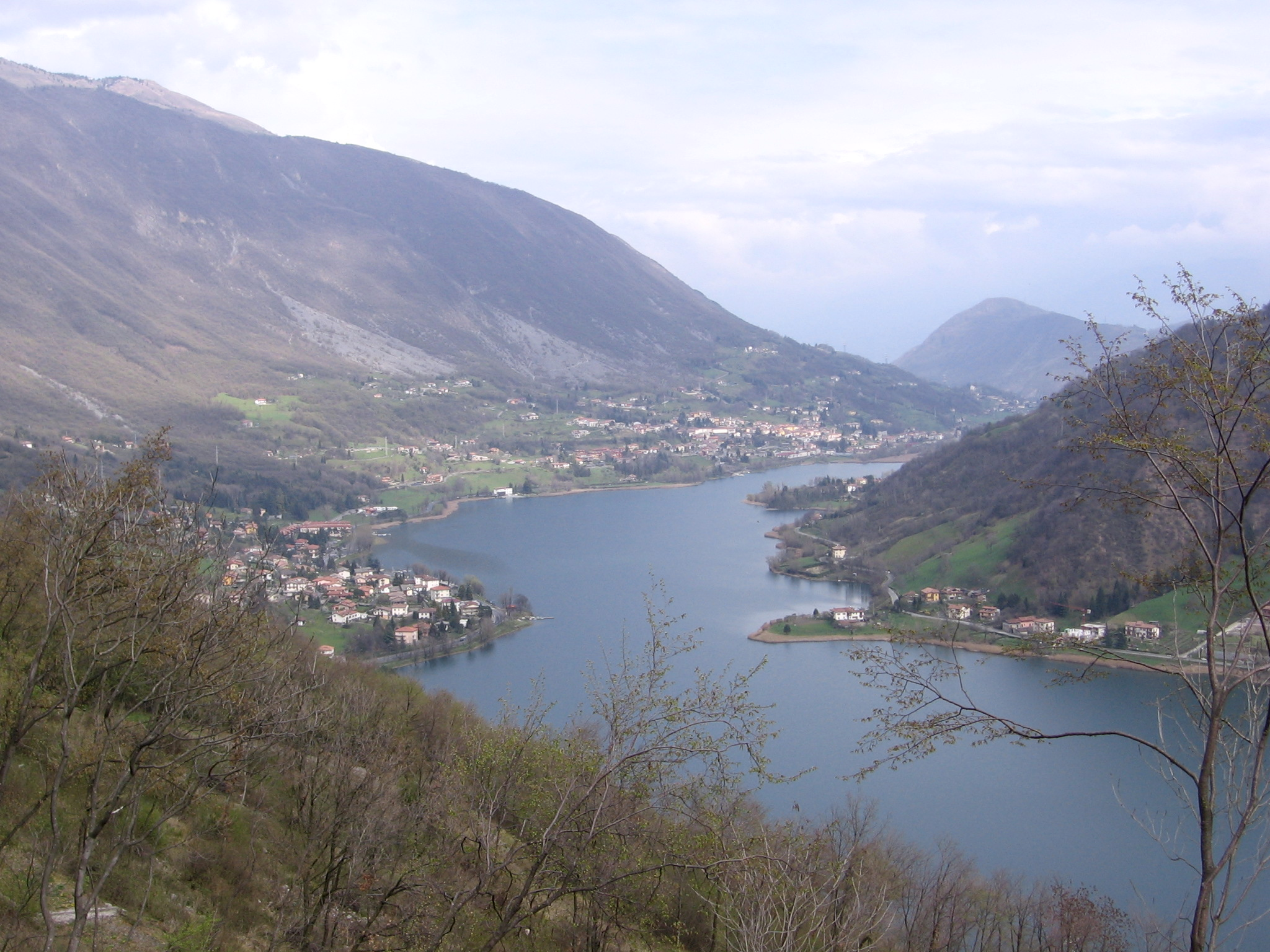 Endine Gaiano, Bergamo, Italia